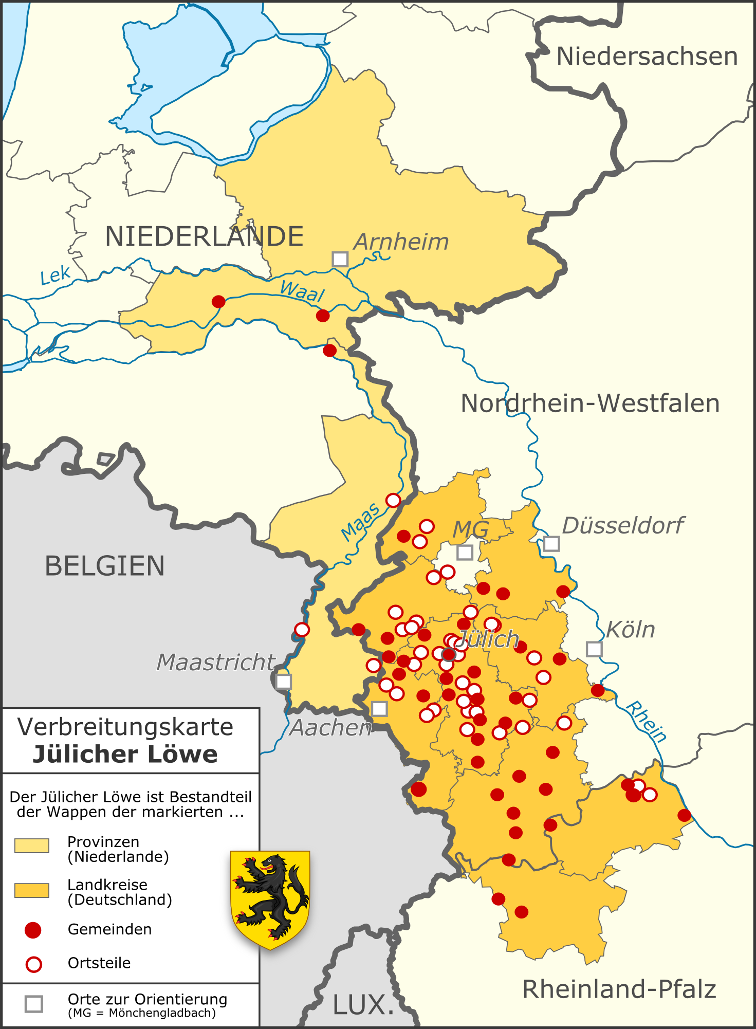 Städte/Gemeinden, Stadtteile/Ortsteile, Landkreise sowie niederländische Provinzen, die den Jülicher Löwen im Wappen tragen.